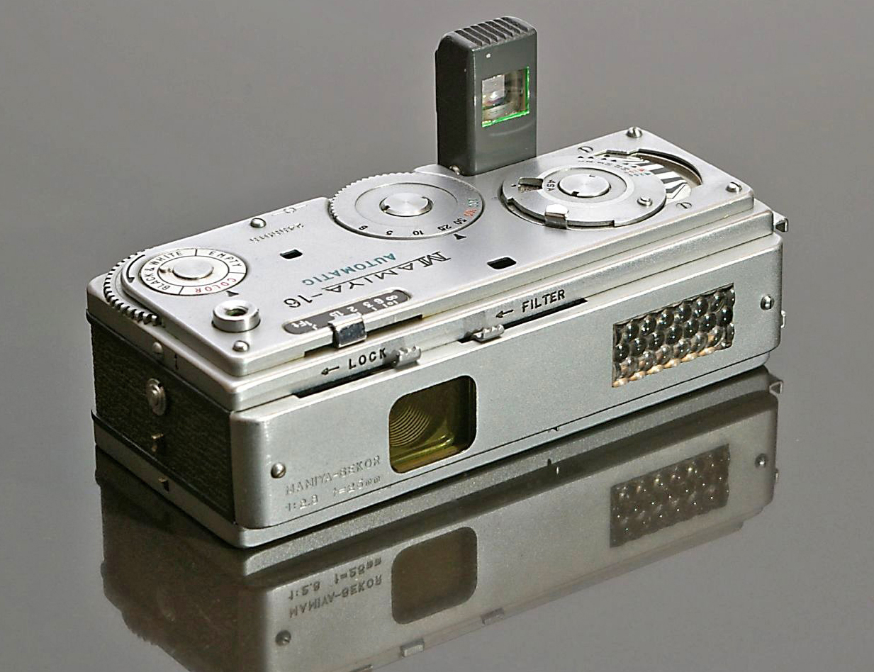 Mamiya16